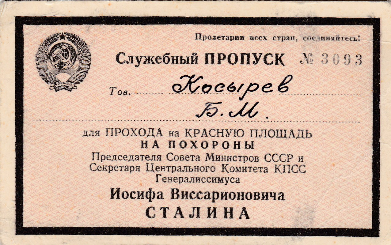 Пропуск Бориса Косарева на Красную площадь, на похороны В.И. Сталина